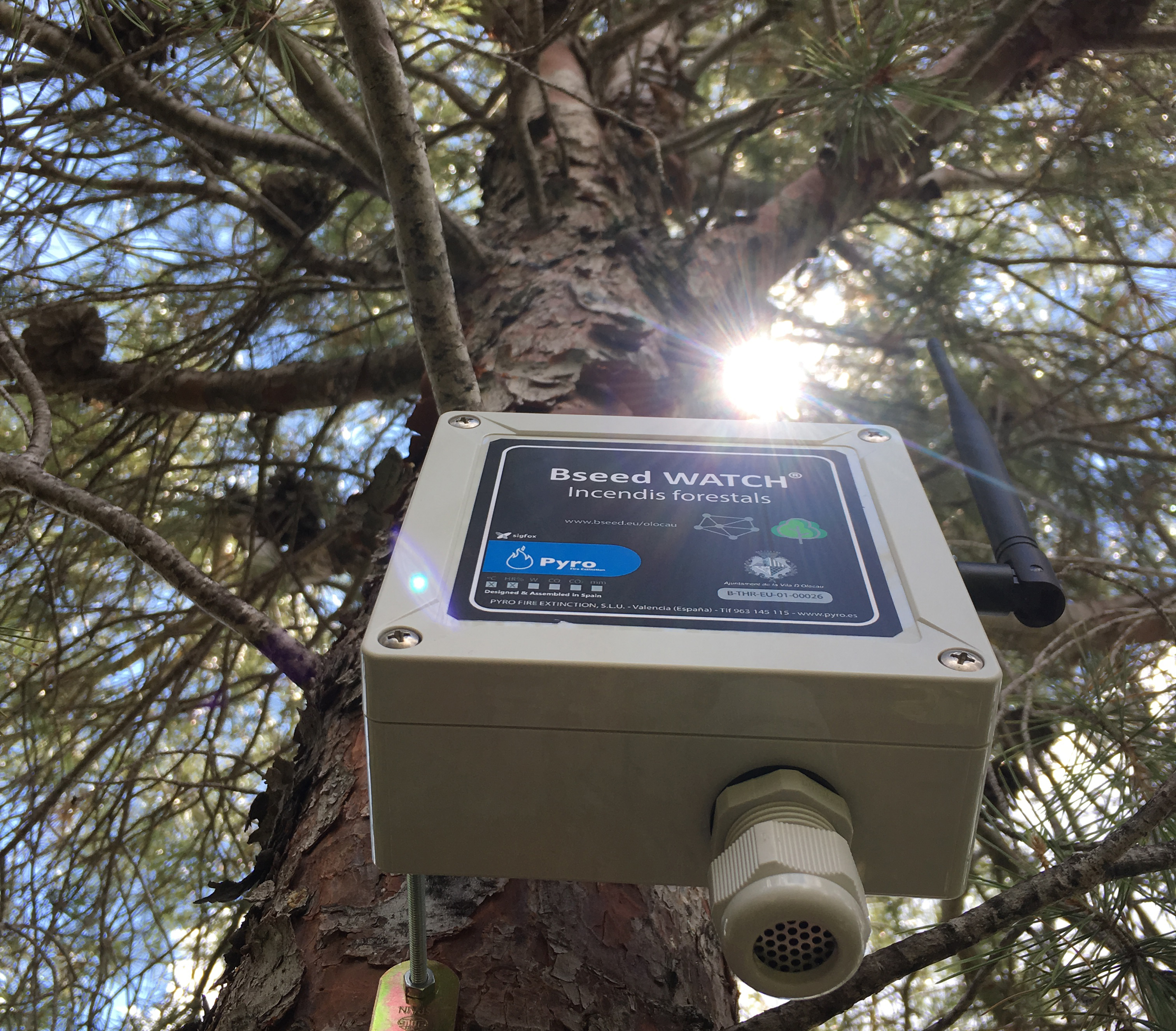 Sistema de detección de incendios forestales